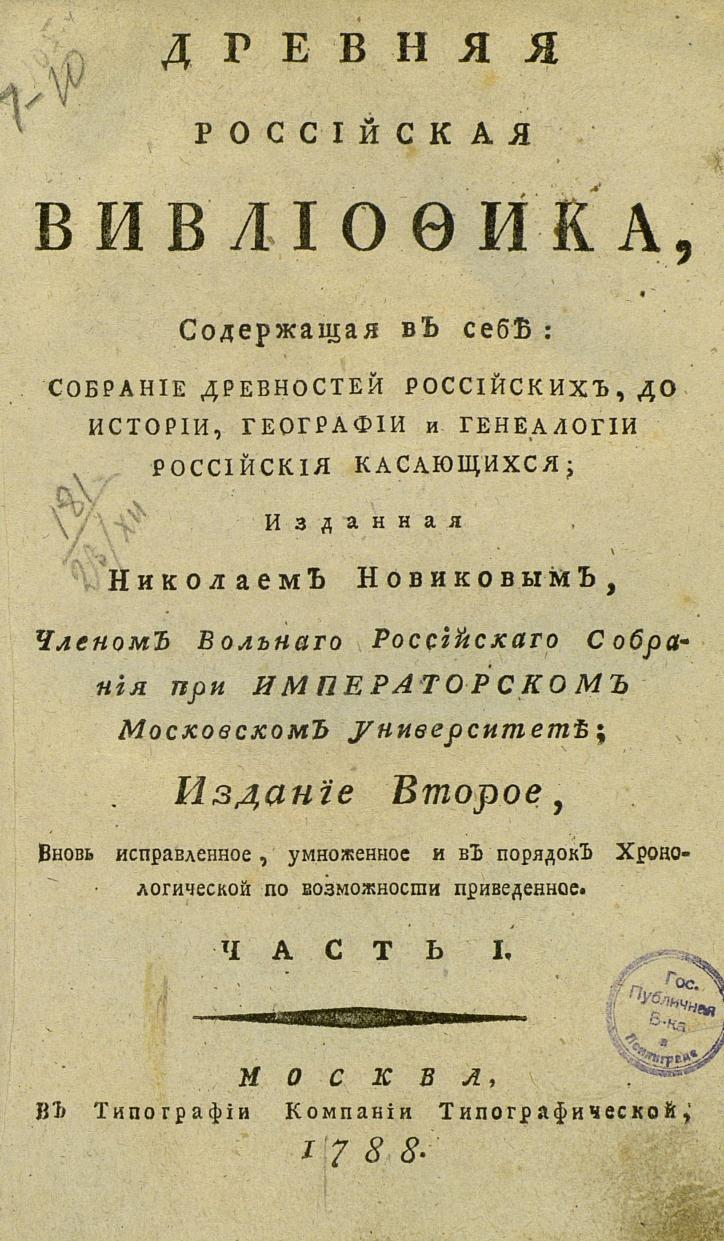 Титульный лист. Древняя Русская Вивлиофика 1788 часть 1